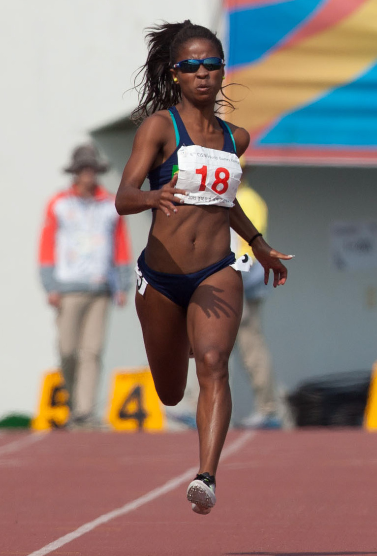 Vitória Cristina Rosa, 6º Jogos Mundiais Militares. Foto: Sgt Johnson Barros